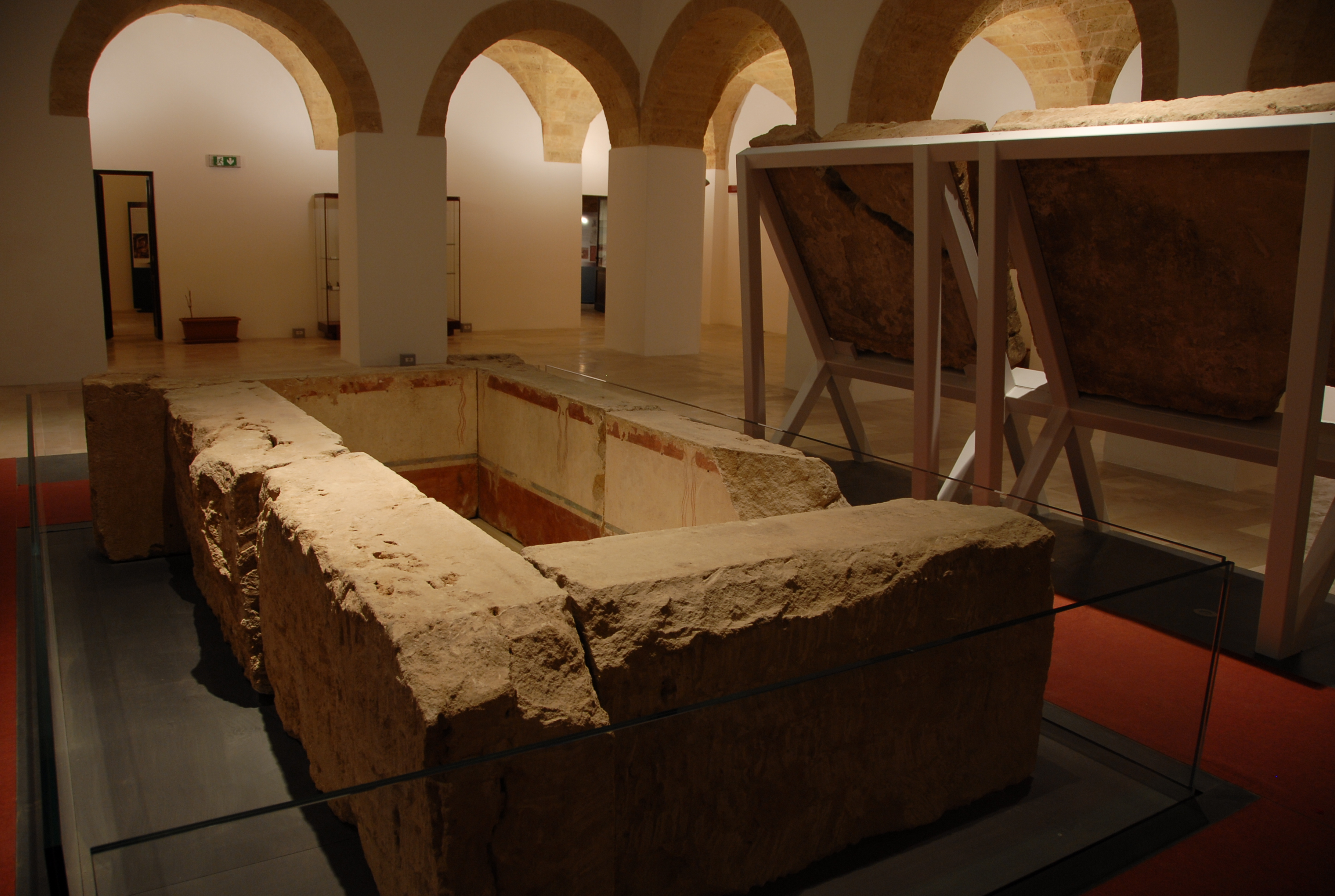 ugento